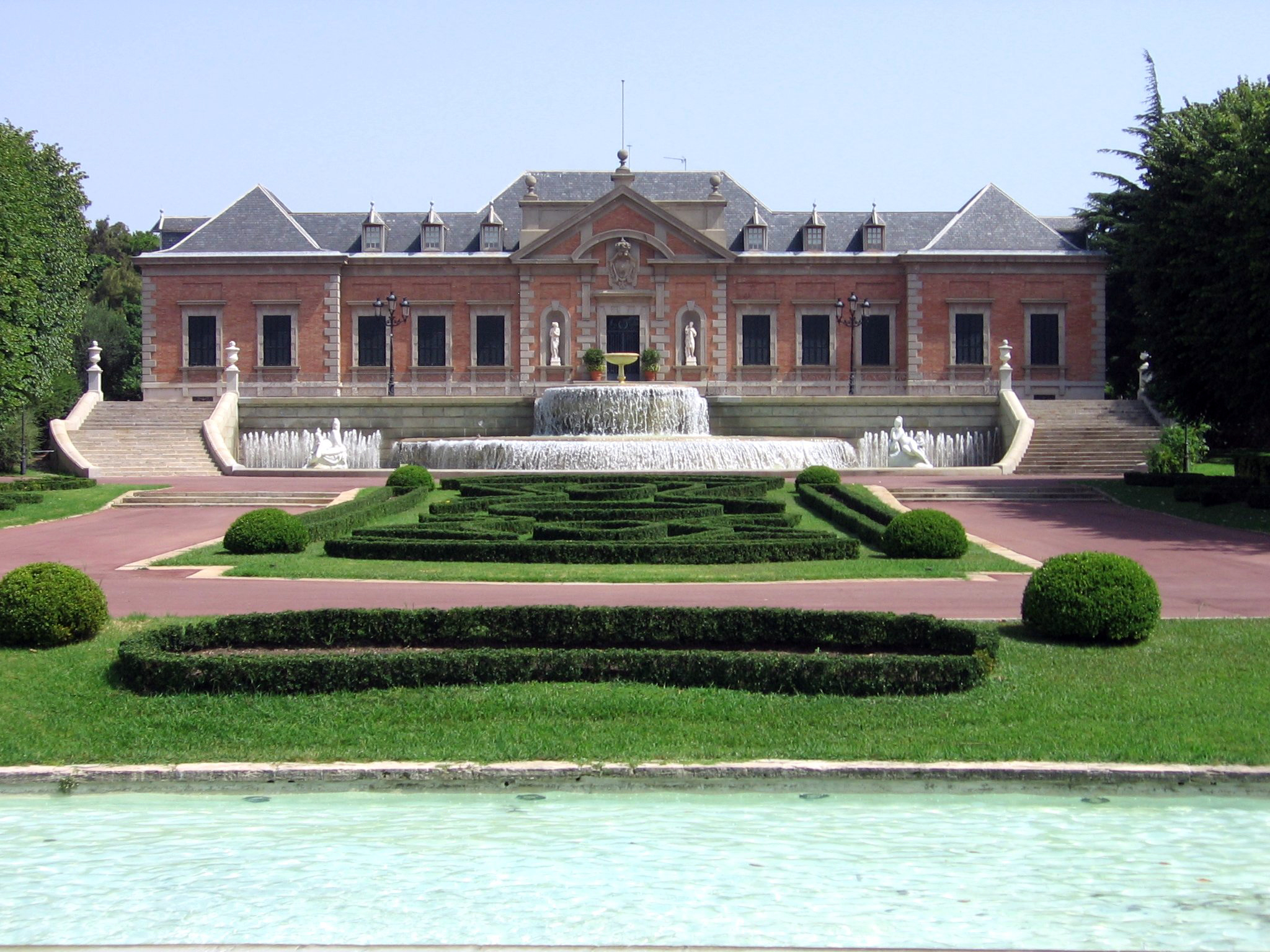 Palacete Albéniz, Barcelona.